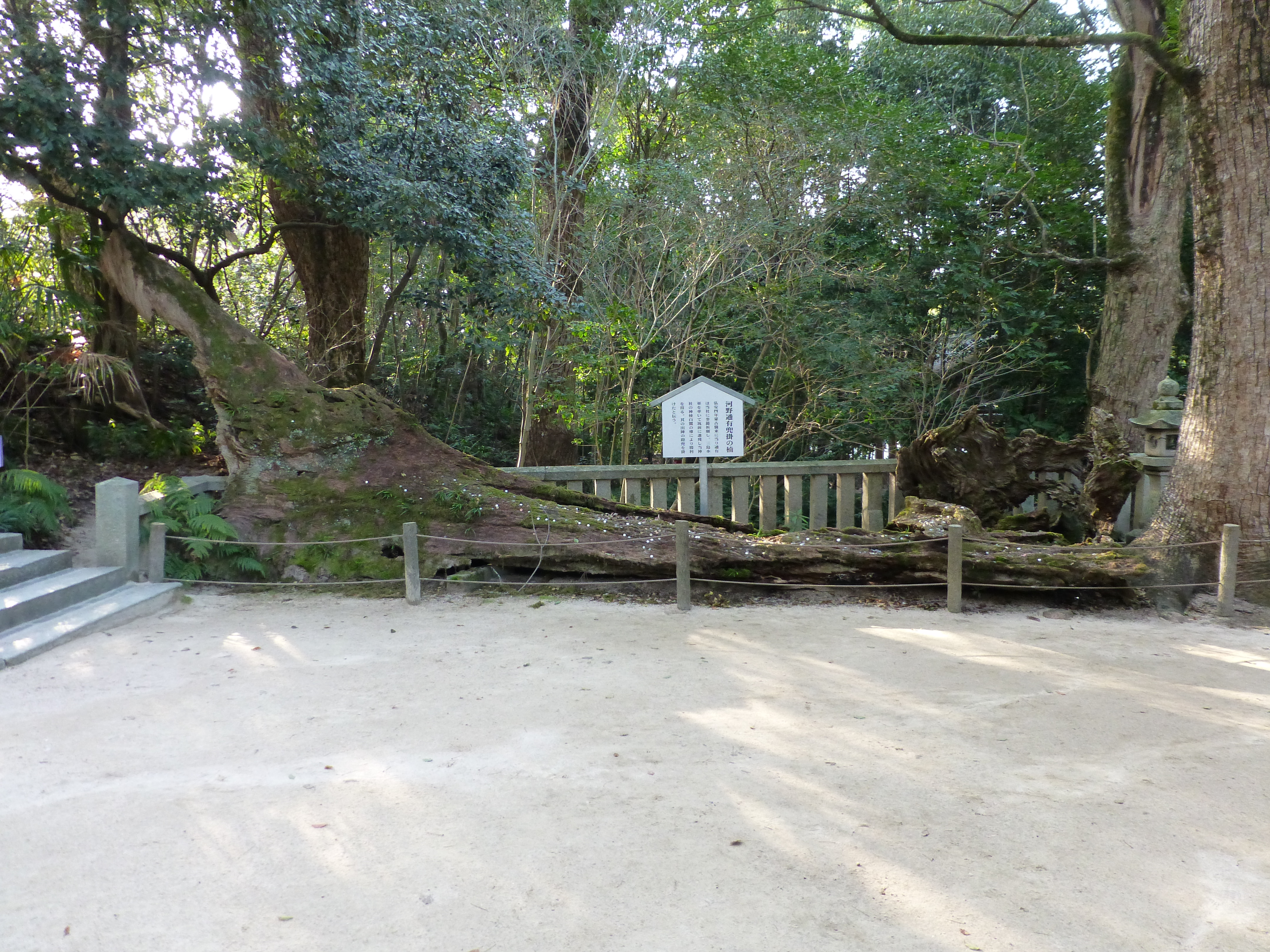 2013年3月投稿者撮影